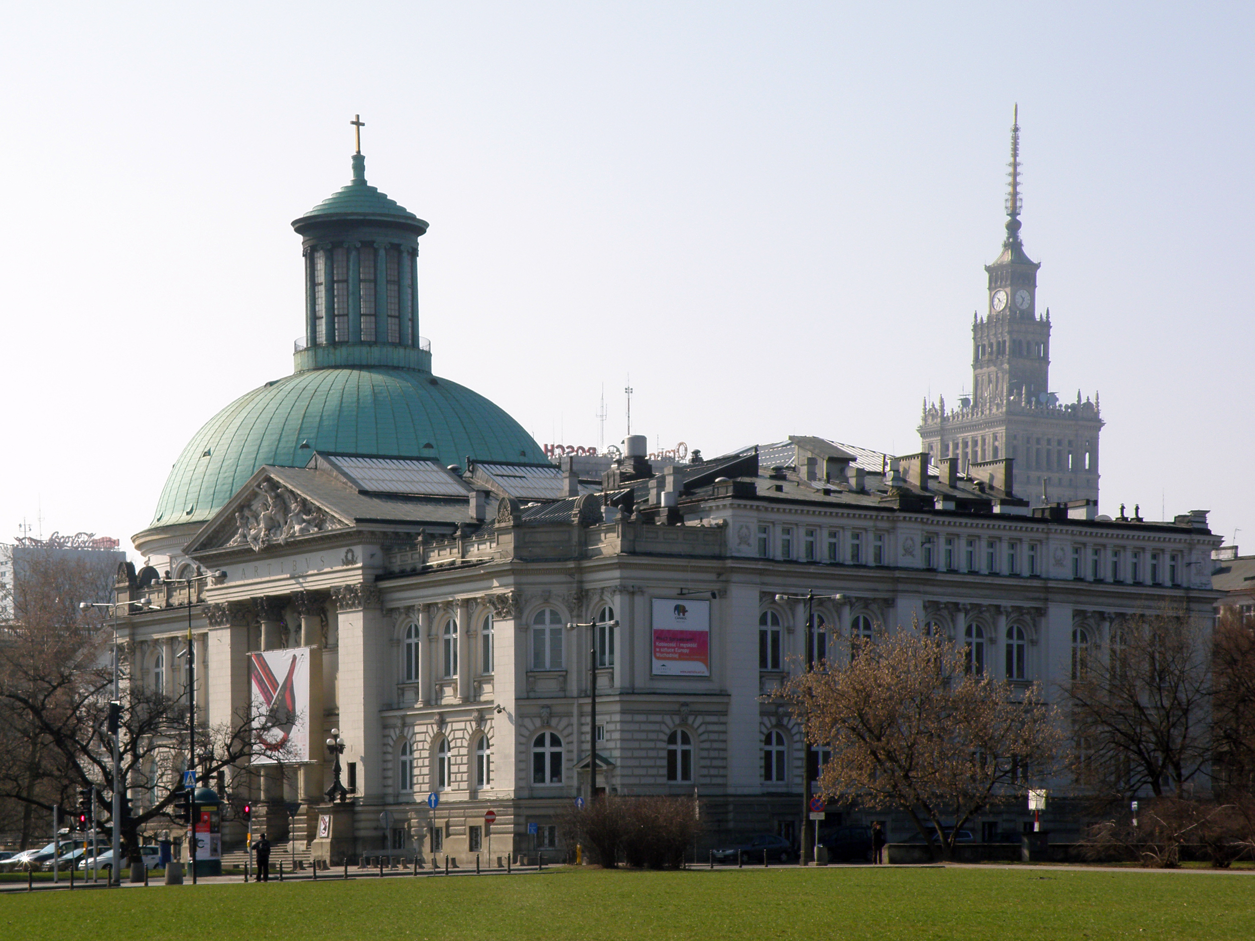 Zachęta Narodowa Galeria Sztuki